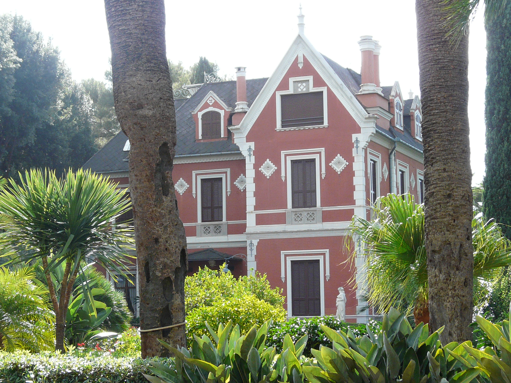 Villa del Trattato, Rapallo, Liguria, Italia